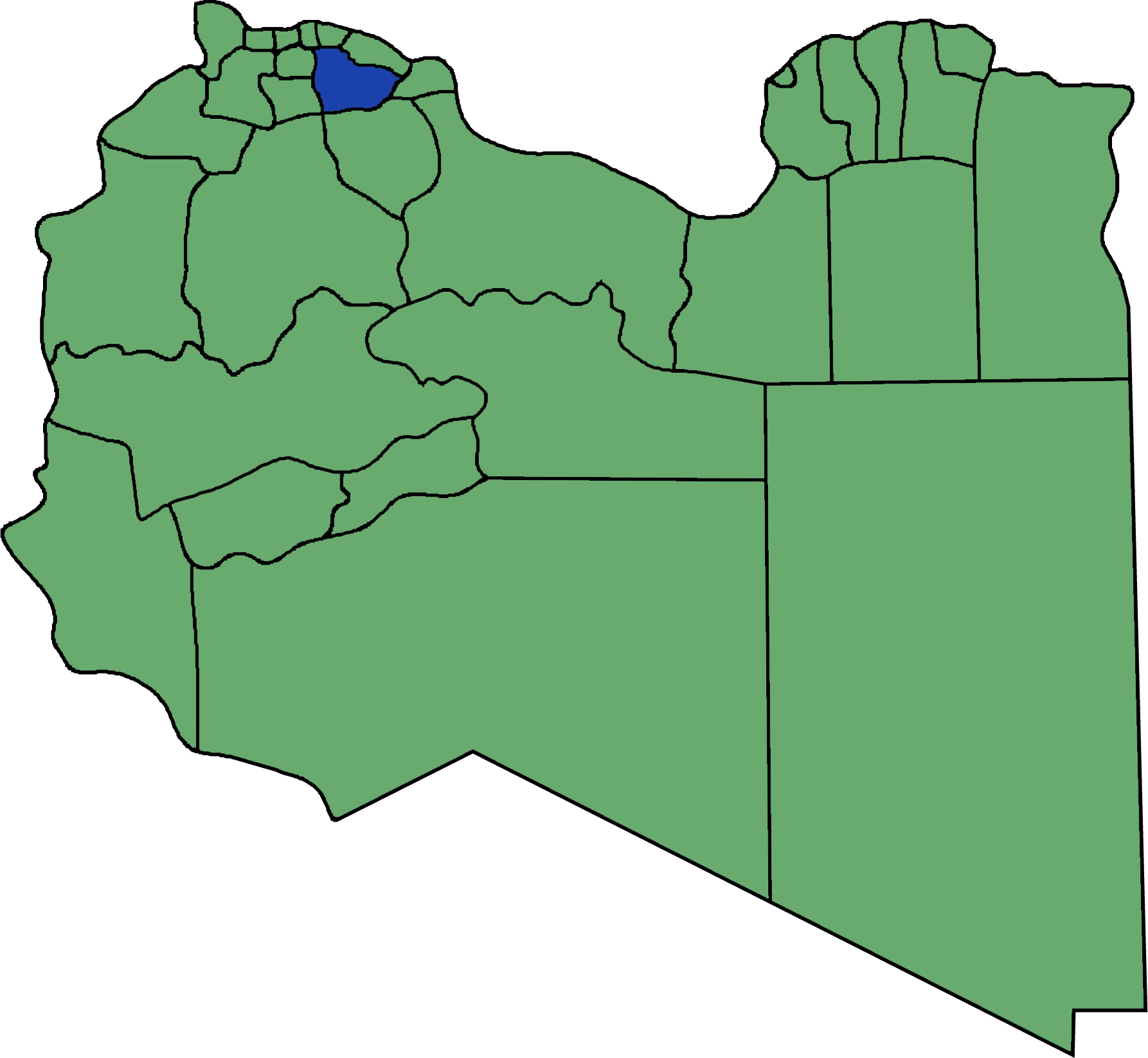 Die neuen Gemeinden (Munizipien) in Libyen. Tarhuna Wa Msalata hervorgehoben.